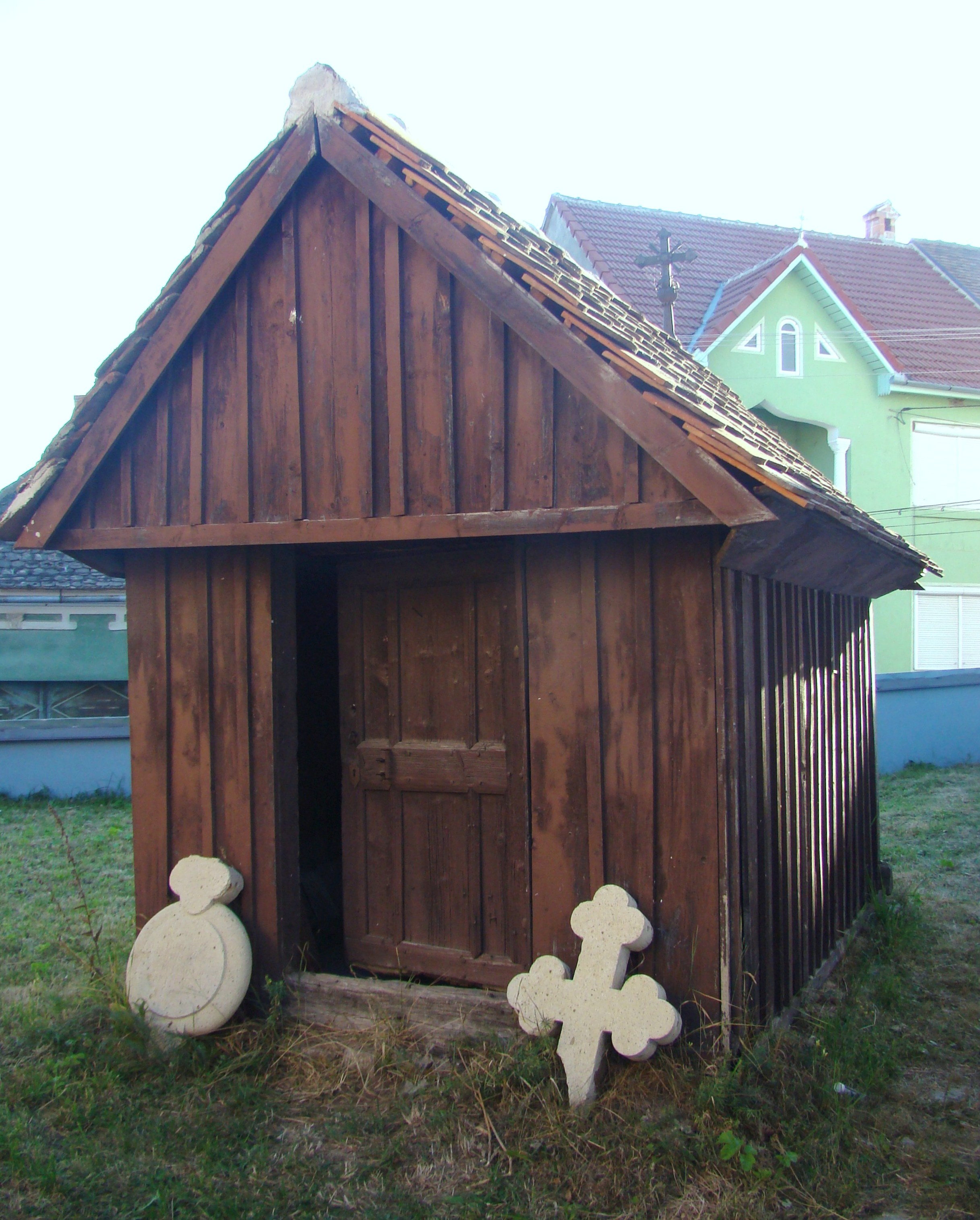 Edicul „Osuar” cu pictură pe pânză